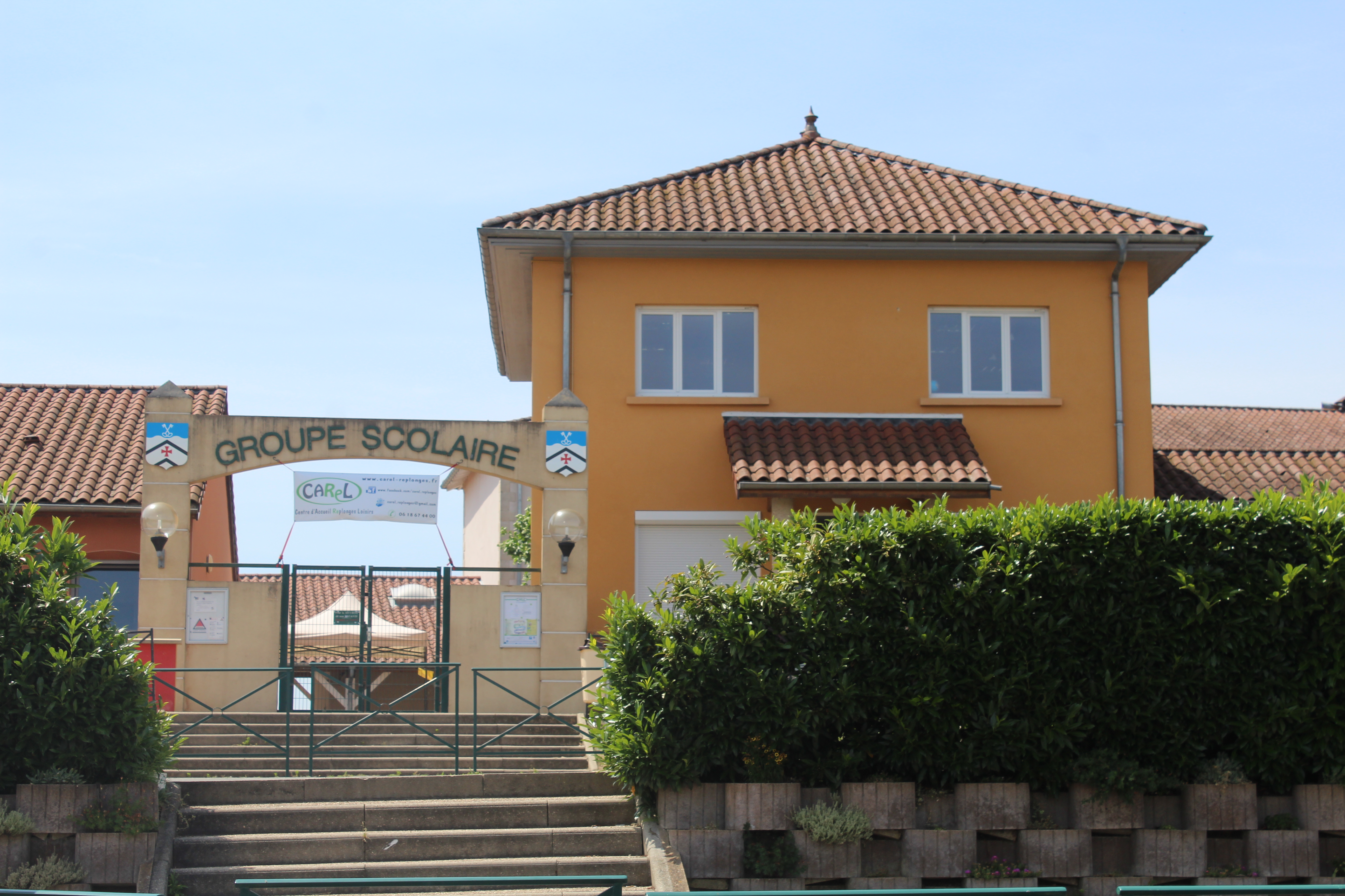 Groupe scolaire de Replonges.